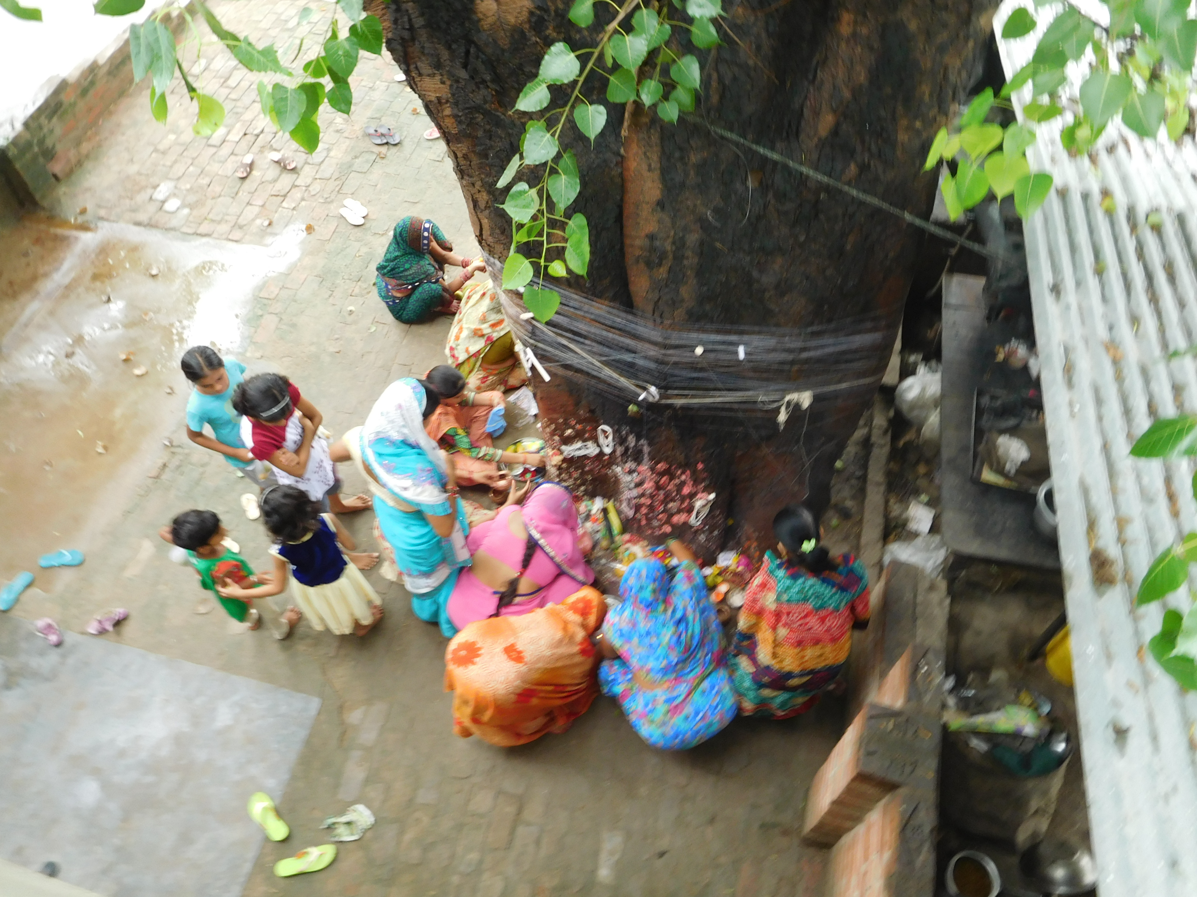 इस व्रत में हिन्दू कैलेण्डर वर्ष में जिस अमावस्या के दिन सोमवार का दिन पड़ता है उस दिन अश्वत्थ (पीपल ) वृक्ष की १०८ बार परिक्रमा करते हुए महिलाएं इस व्रत का अनुष्ठान करती हैं।